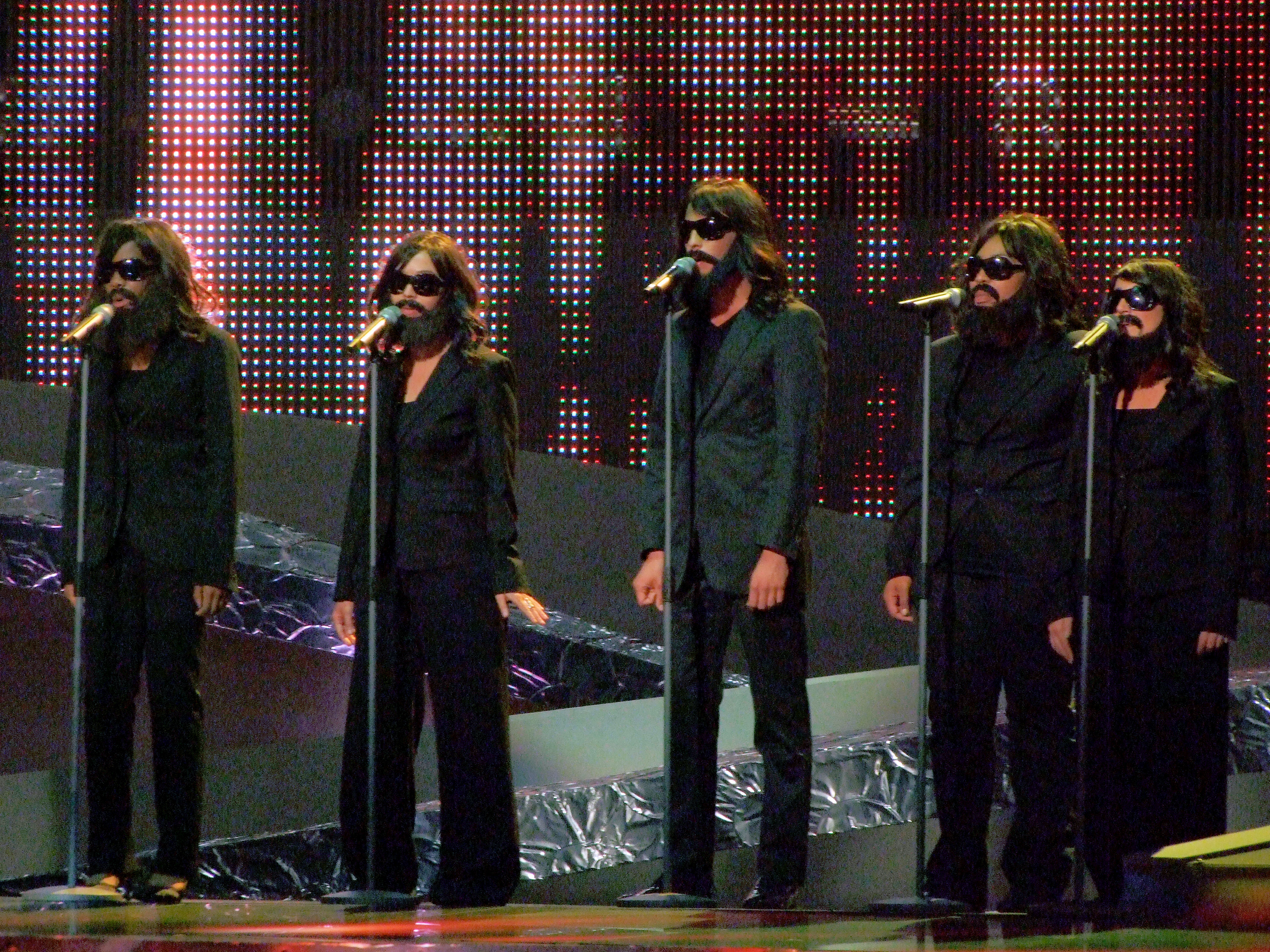 Choristes de Sébastien Tellier pour le concours Eurovision 2008. Dans le désordre : Falone Tayoung, Sheliyah Masry, Abigael et Stanislas Debit, Marie Djemali ; SGS (Soul & Gospel Singers) Paris